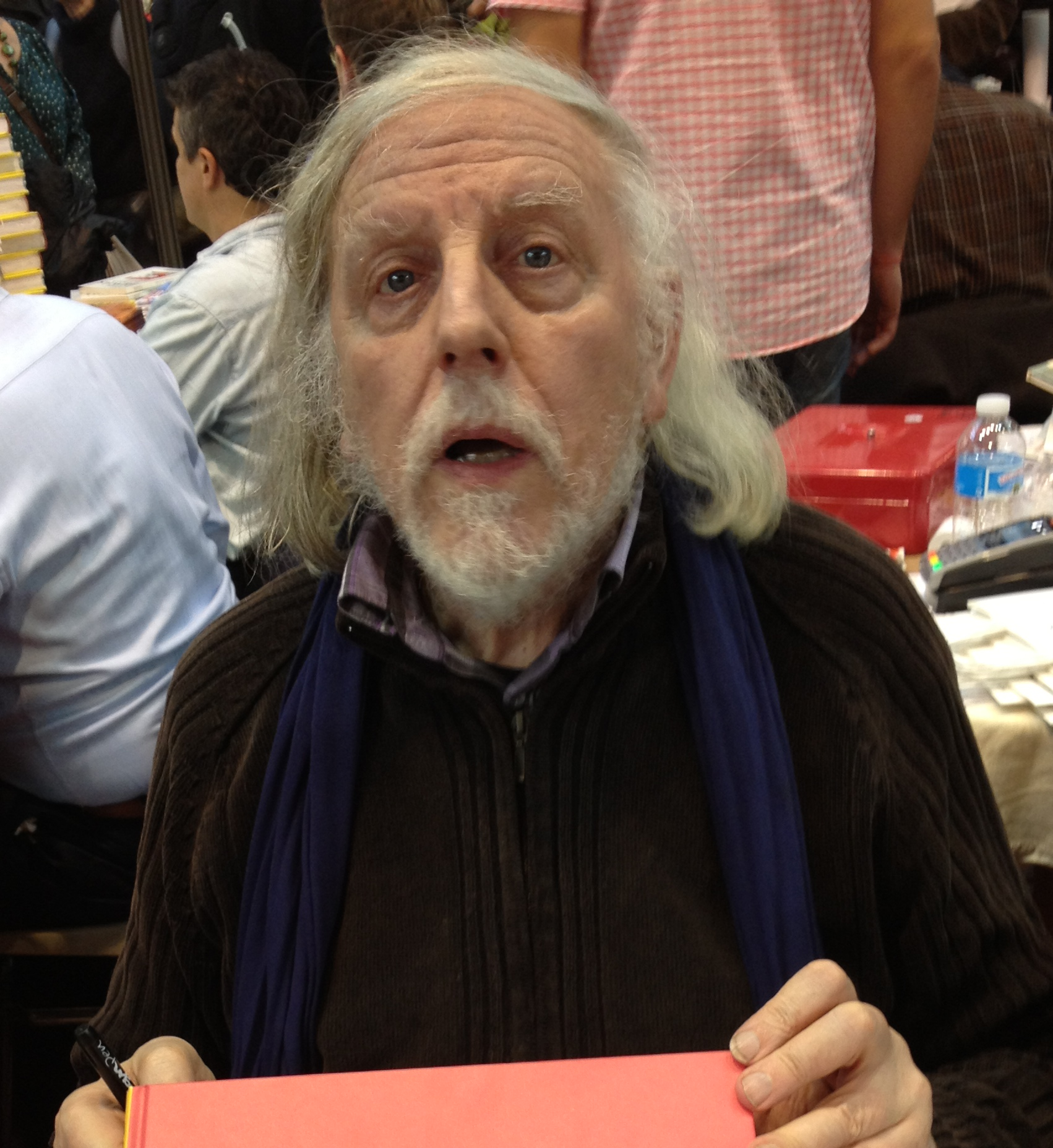 Philippe Honoré à la foire du livre de Brive